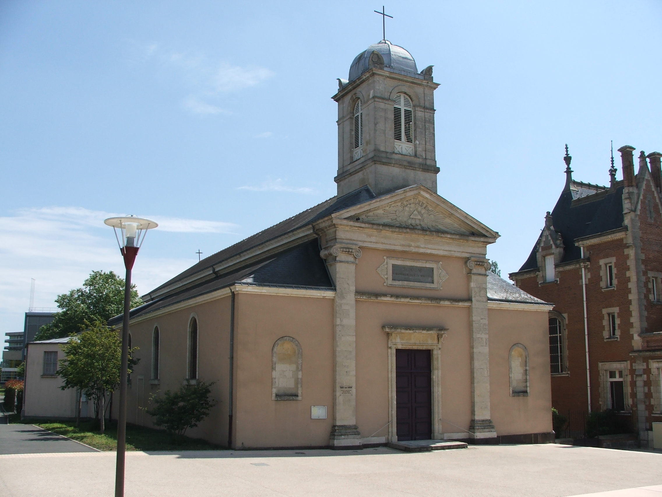 L'Eglise Saint-Martin de Pontlieue au Mans.